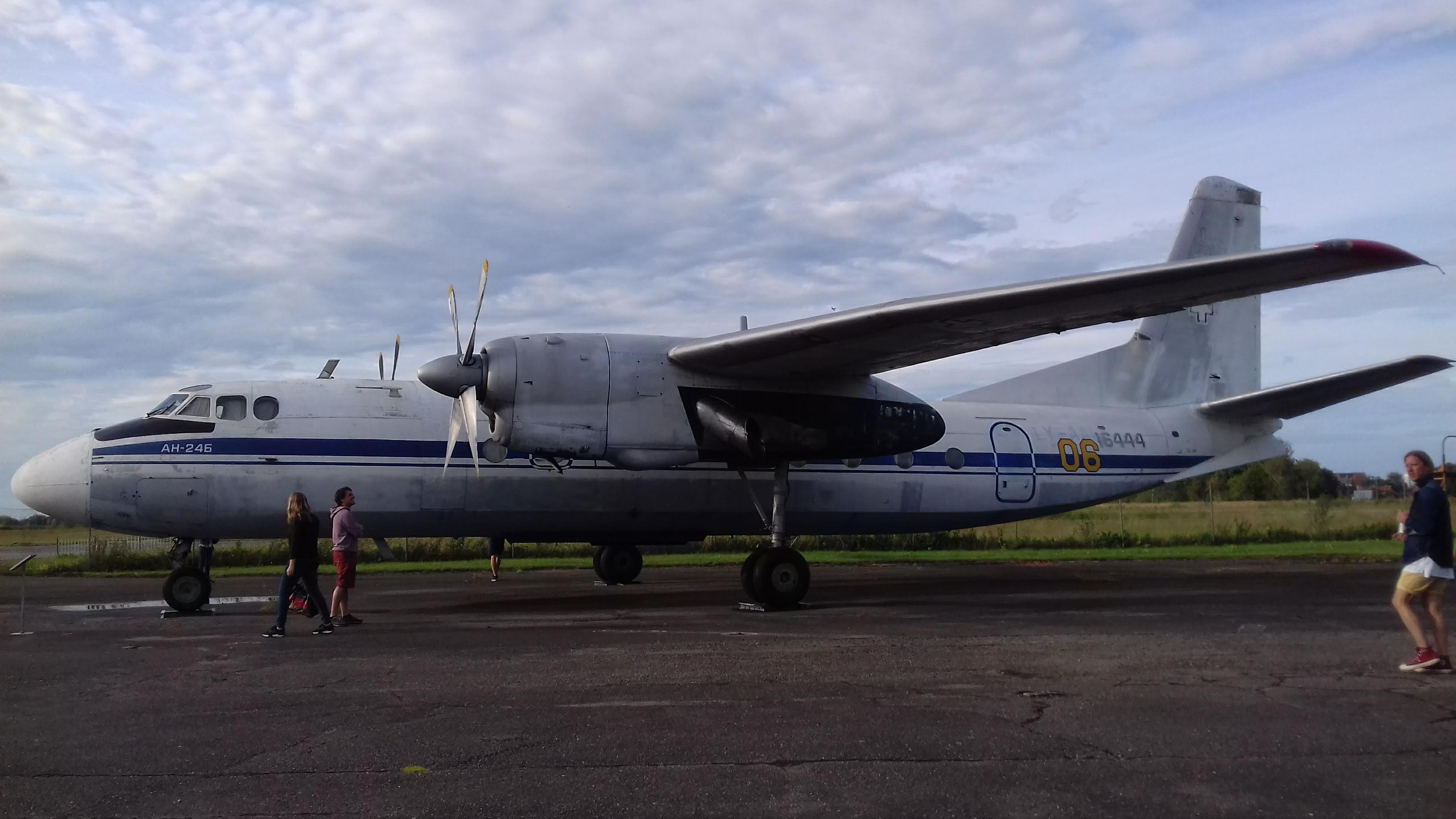 Данный экземпляр совершил певый полёт 26 июля 1968 года. Это был первый Ан-26, эксплуатируемый в Литовском УГА, в 1991 году перешёл авиакомпании "Литовские авиалинии", а в 1994 году - в ВВС Литвы. В последнем эксплуатировался до 1996 года, затем переехал в Каунасский Музей Авиации.